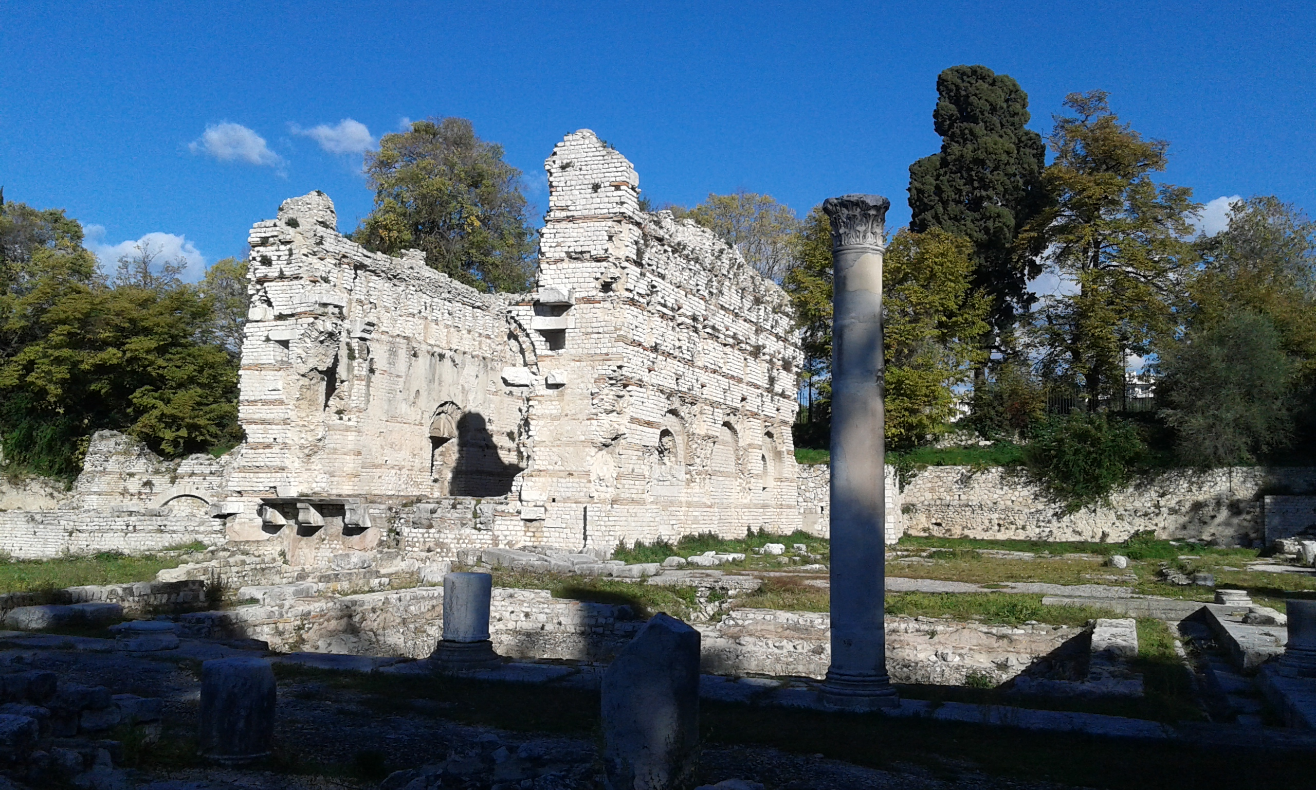 Frigidarium des thermes du nord. Thermes de Cimiez (Nice, Alpes-Maritimes, France) .